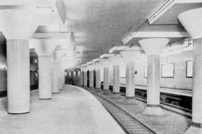 新名古屋駅地下ホーム